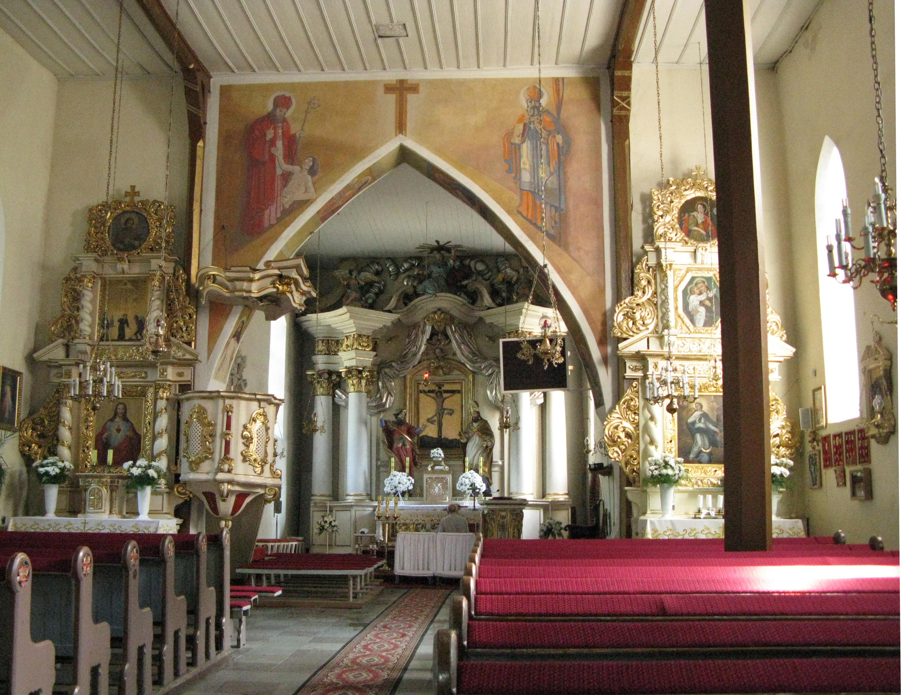 Kościół Podwyższenia Krzyża w Lisewie